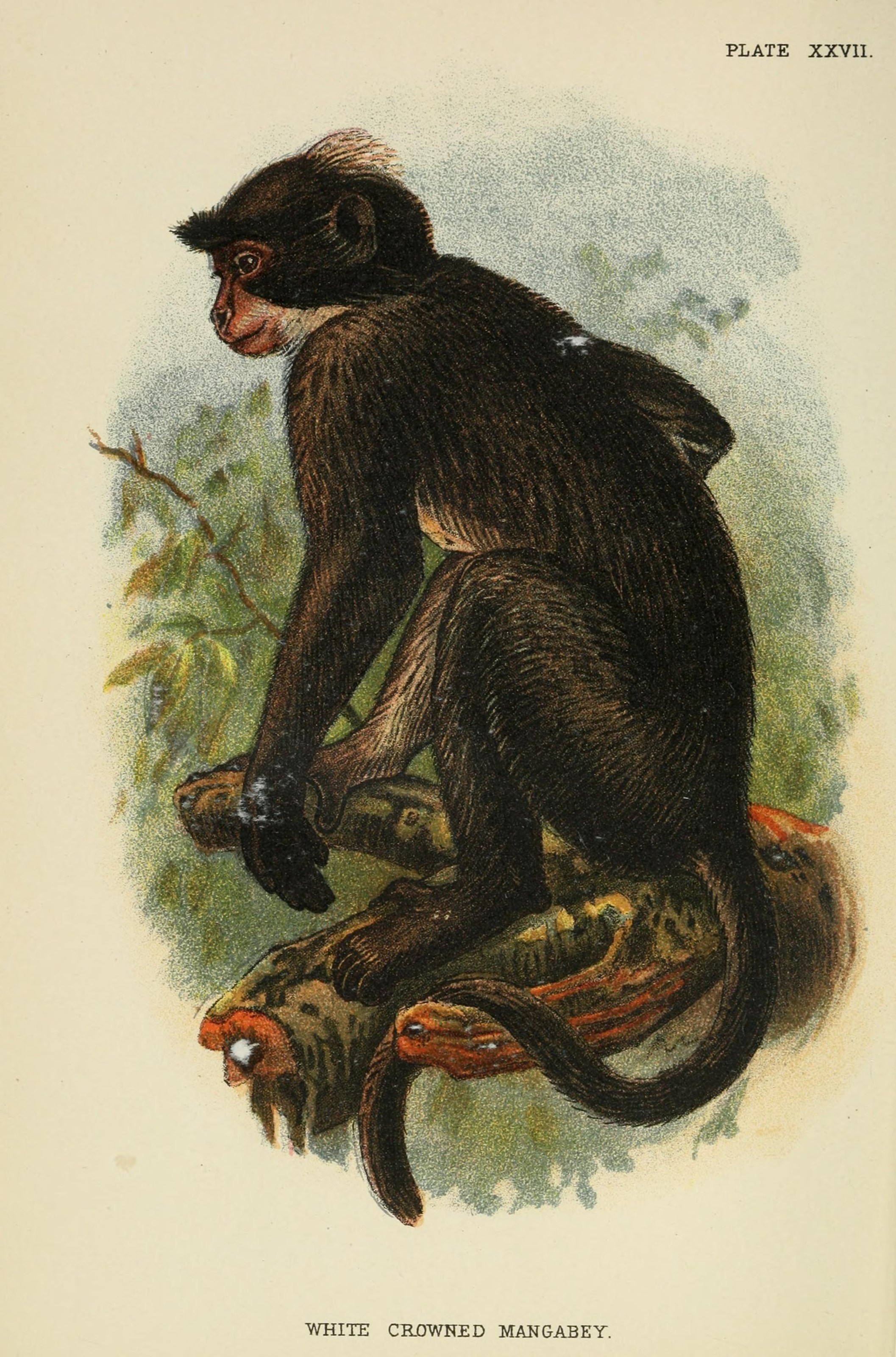 PLATE XXVII. WHITE CRjOWNED MANGABEY.